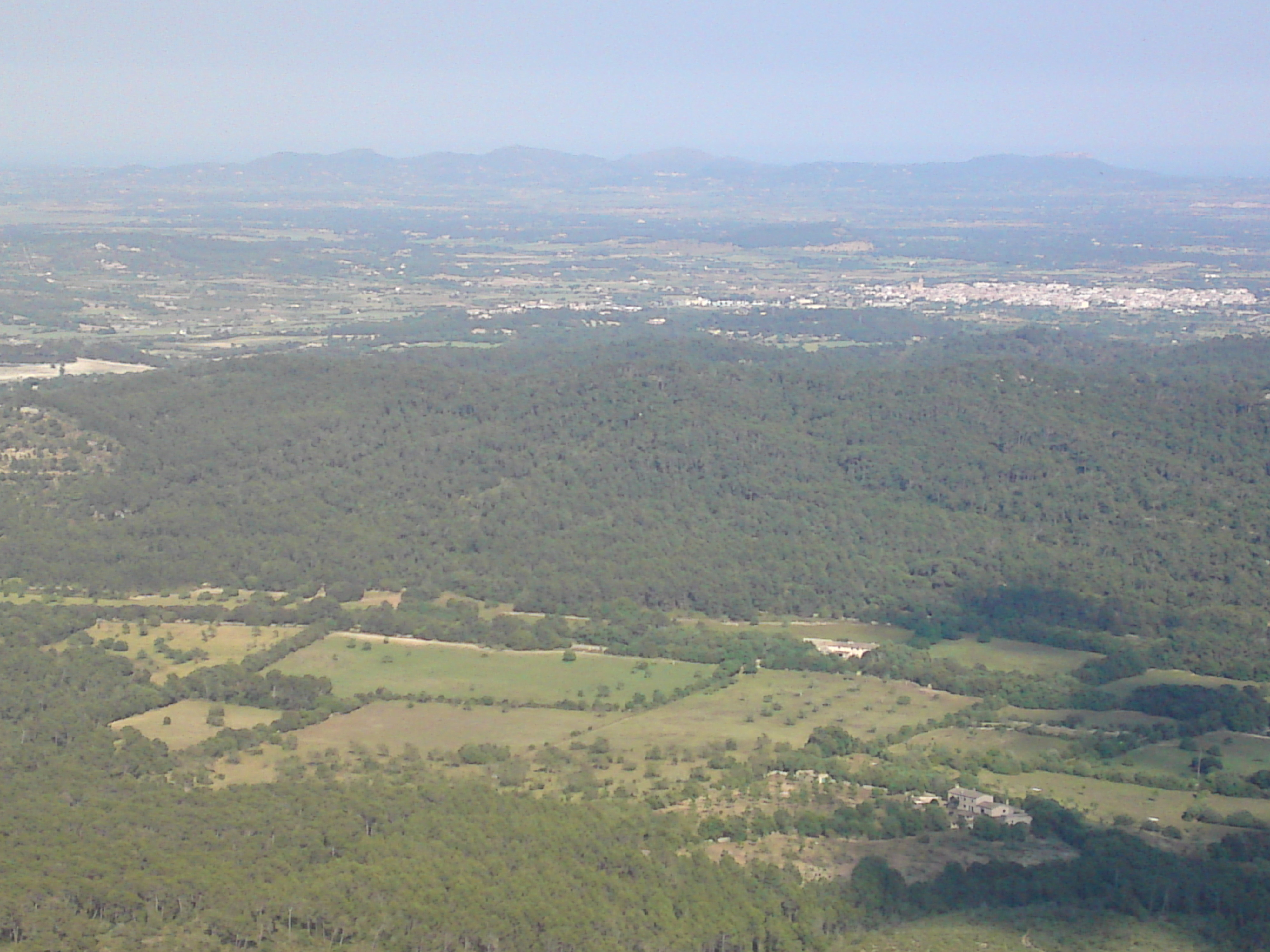 El puig de les Tres Fites des del morro d'en Molll deñ puig de Randa (Mallorca)